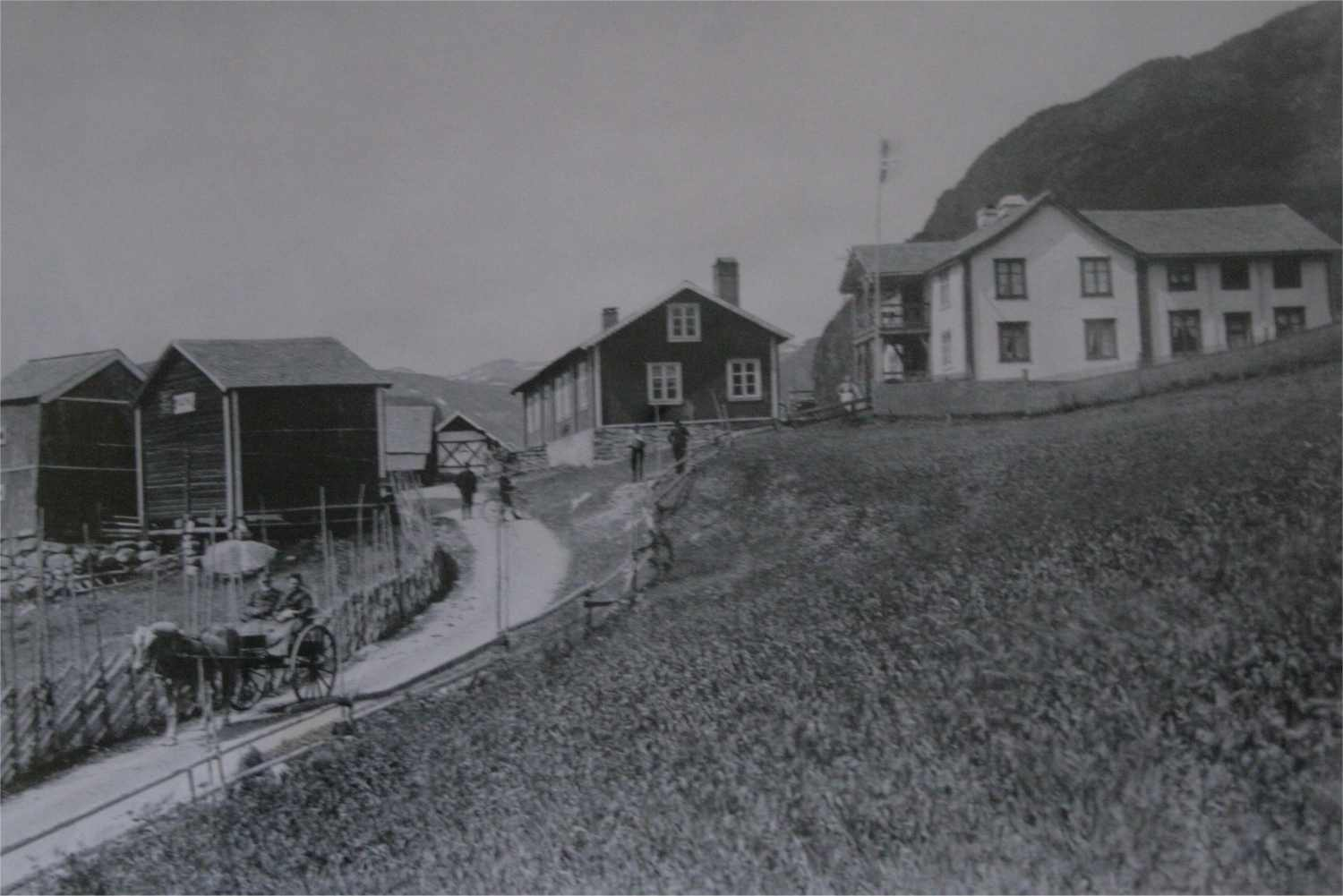 Gammelt postkortbilde tatt ca 1905 av Fausko Skysstasjon. Hemsedal, Norway